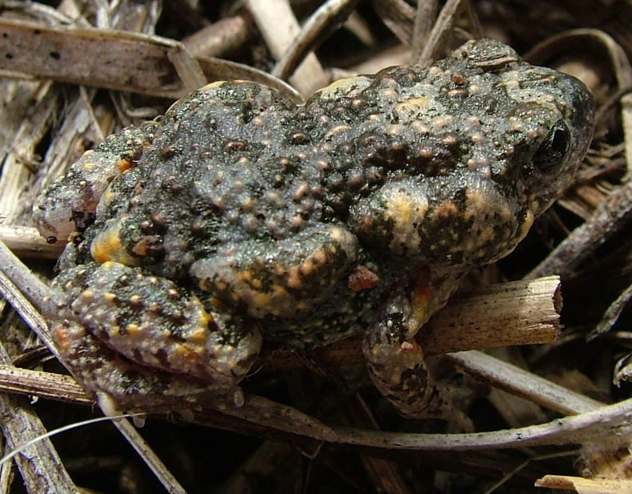 Wrinkled Toadlet (Uperoleia rugosa)